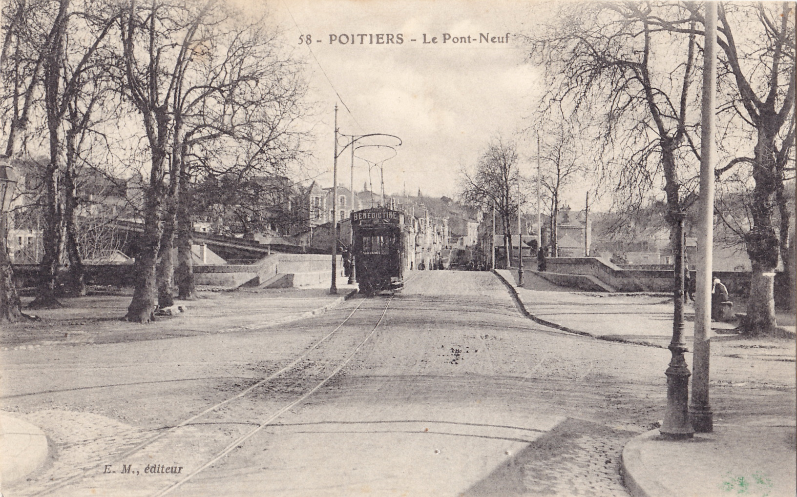 Carte postale ancienne éditée par E. M., n°58 : POITIERS - Le Pont-Neuf